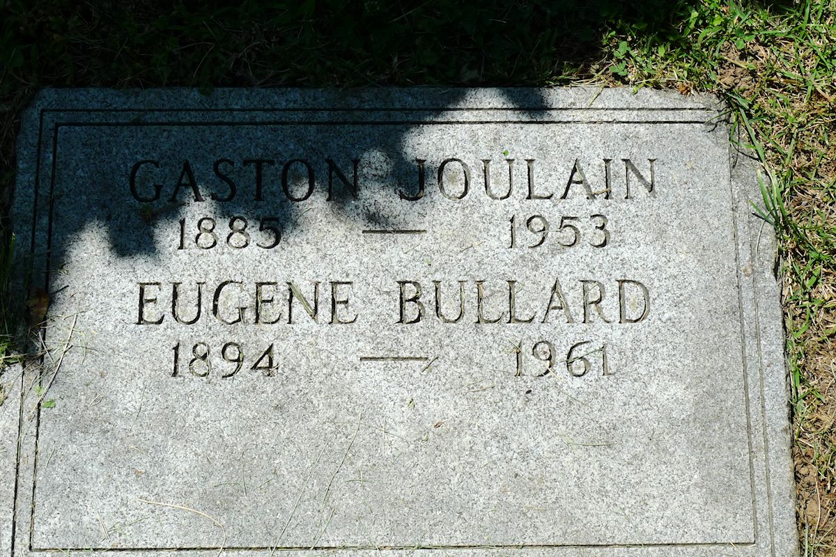 Pierre tombale d'Eugene Bullard dans le carré des anciens combattants français du cimetière de Flushing (New York). Photo prise le 7 juin 2014.